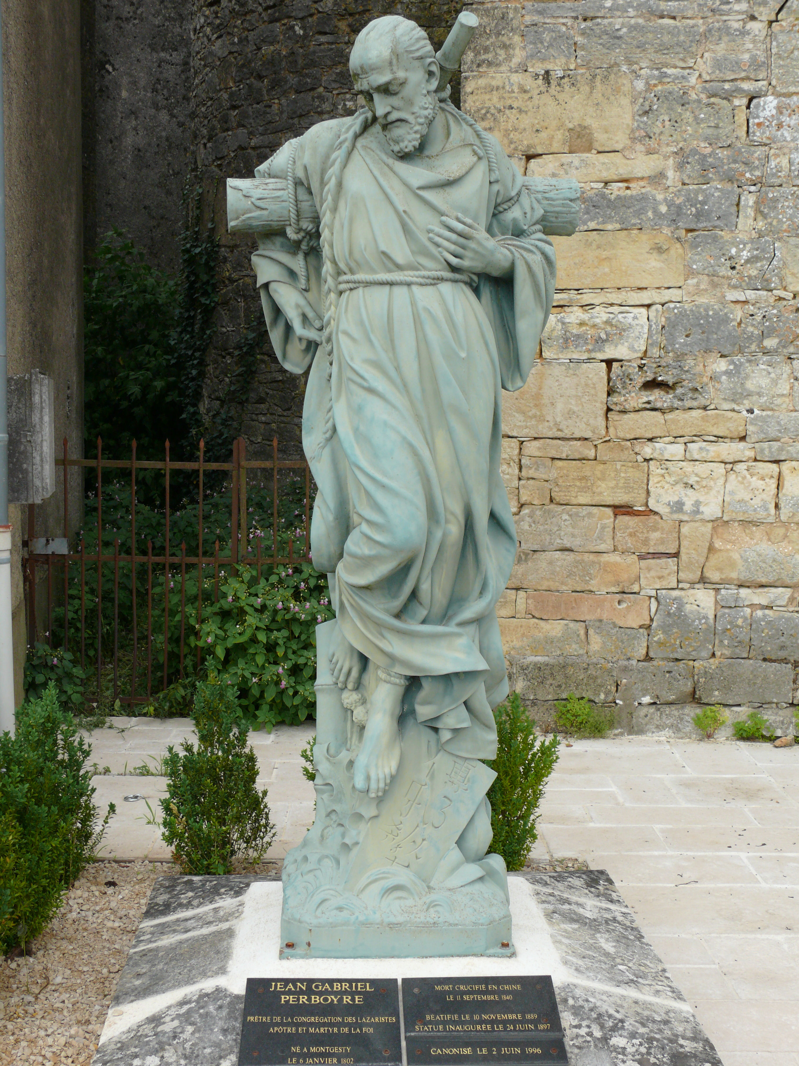 Statue de Jean-Gabriel Perboyre devant l'église de Montgesty